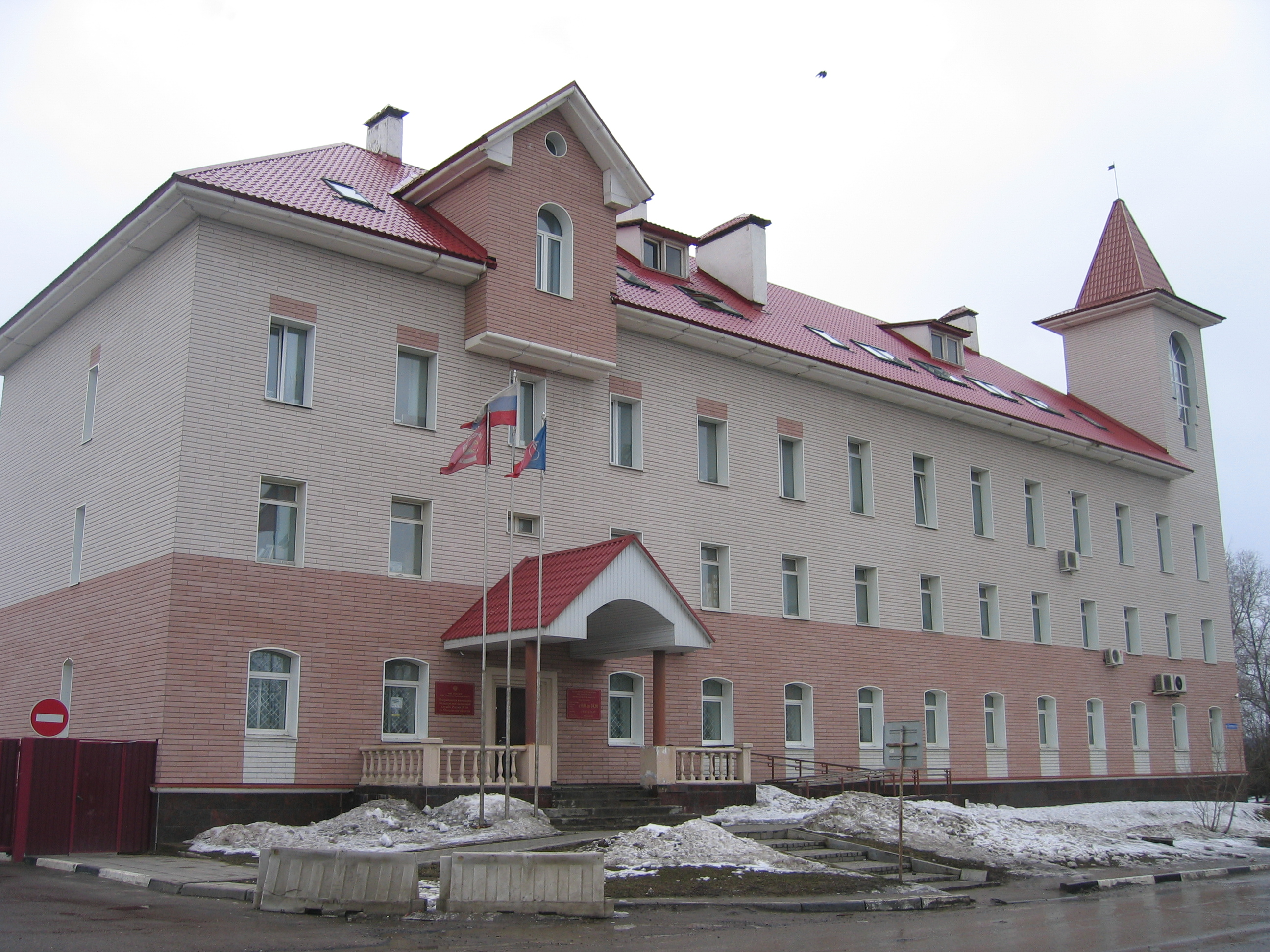 Управление налоговой службы в Щёлково